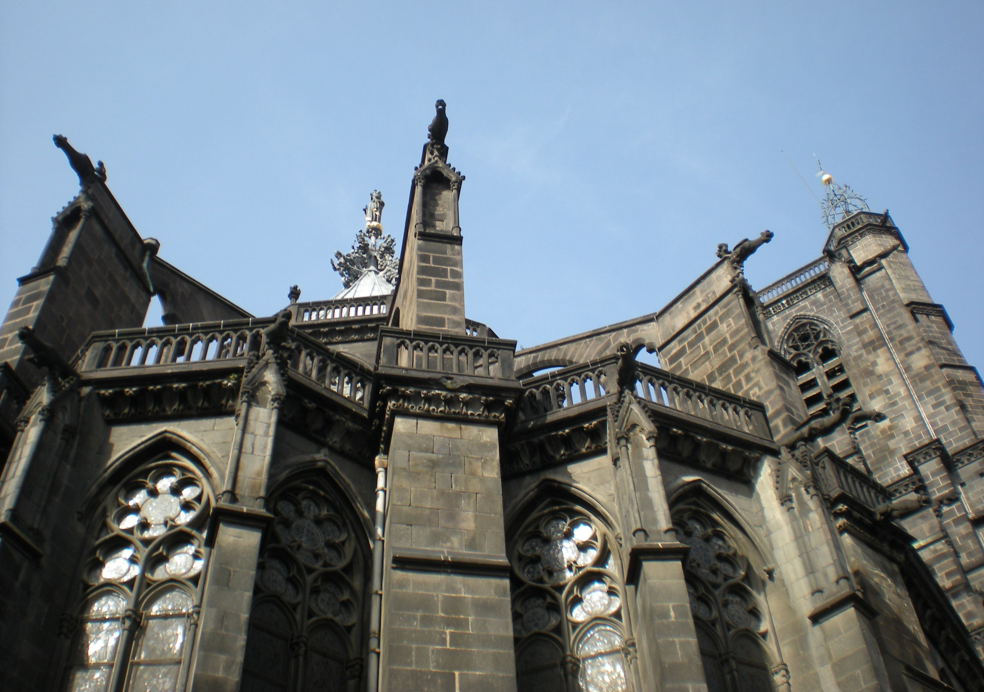 Detalle de la zona absidal de la catedral de Clermont-Ferrand.